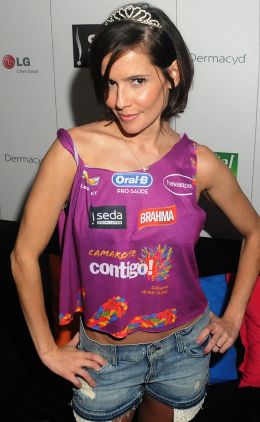 Deborah Secco no Carnaval de 2012.